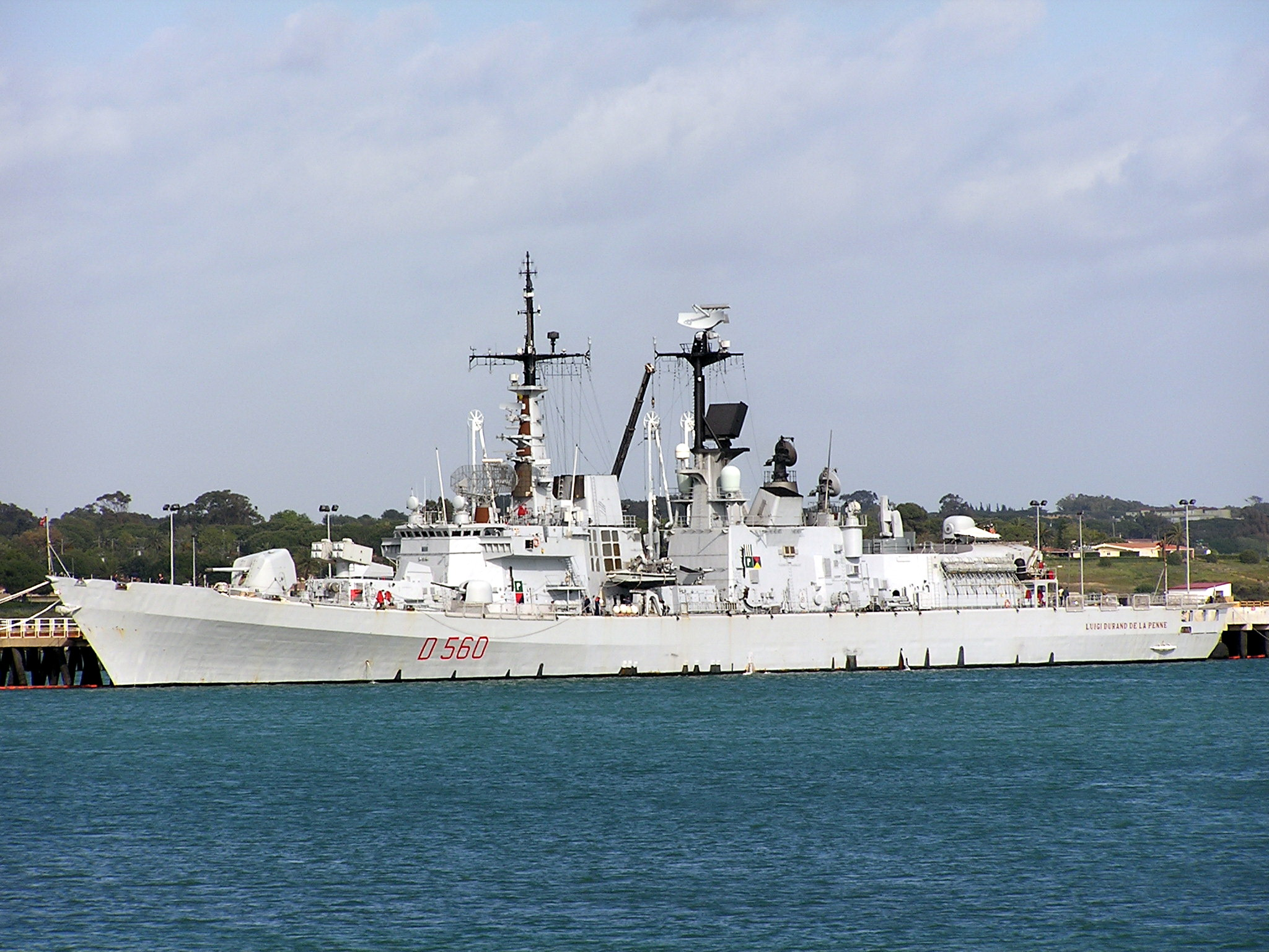 Il cacciatorpediniere Durand de la Penne ormeggiato nel porto spagnolo di Rota